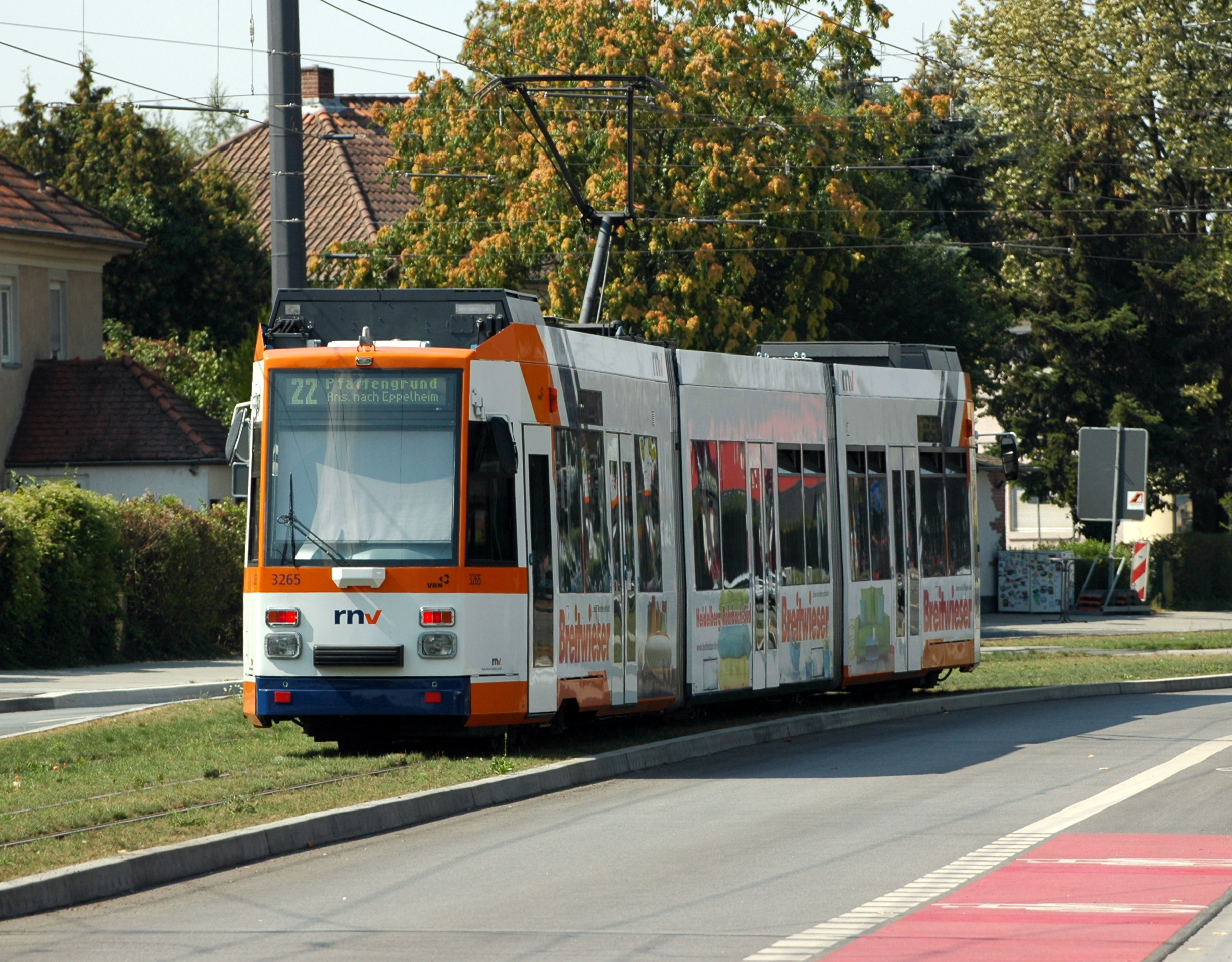 Heidelberg - Düwag MGT6D3 - RNV 3265